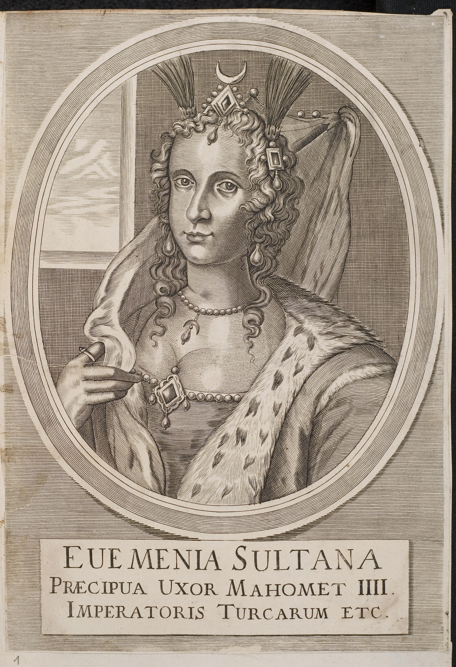 Grafik aus dem Klebeband Nr. 2 der Fürstlich Waldeckschen Hofbibliothek Arolsen Motiv: "Eumenia Sultana Praecipua uxor Mahomet IIII. Imperatoris Turcarum etc." (Eumenia, Hauptfrau des Sultans Mehmeds IV.)